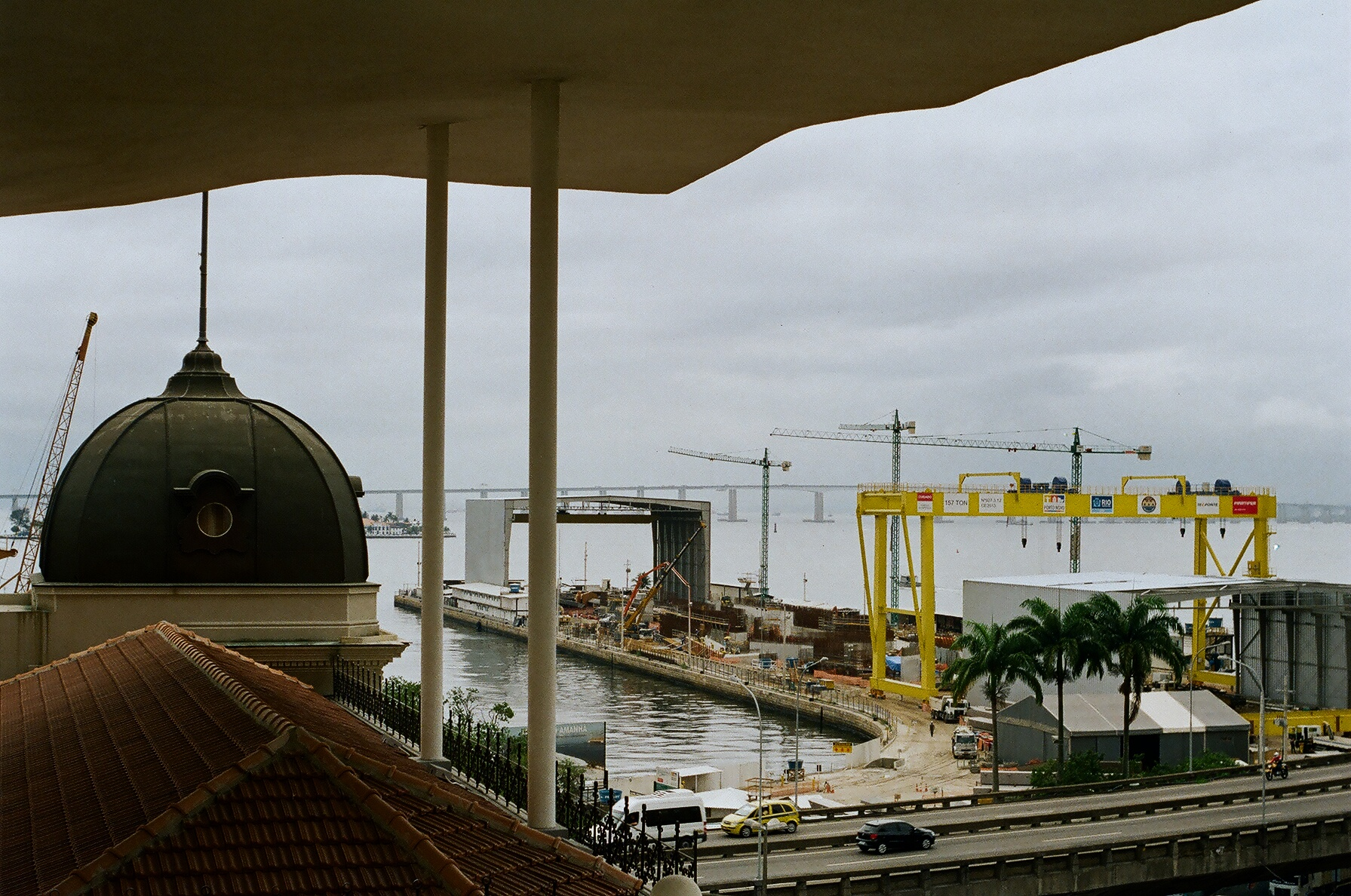 Rio de Janeiro: setembro 2013